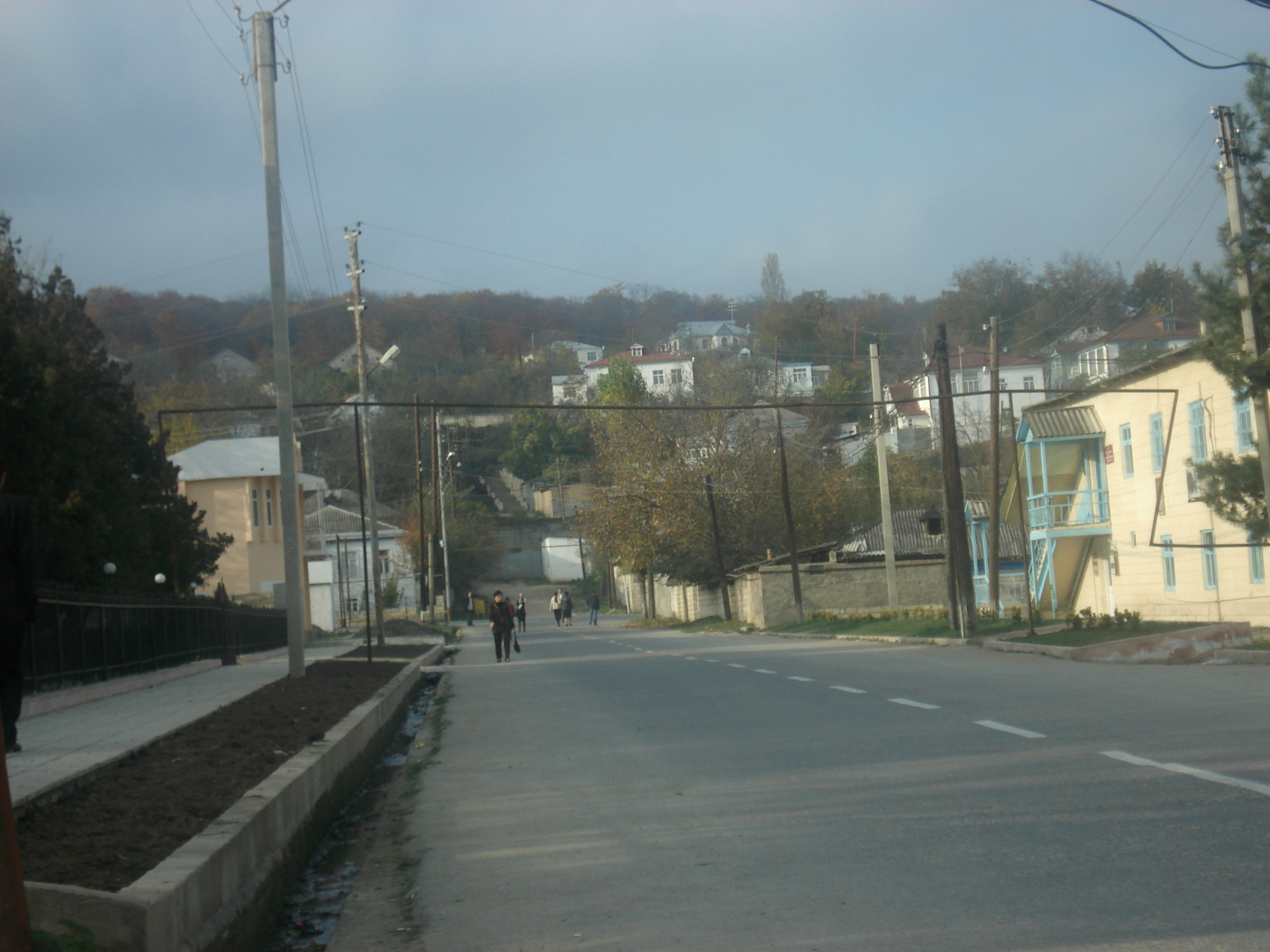 Улица в Кусарах